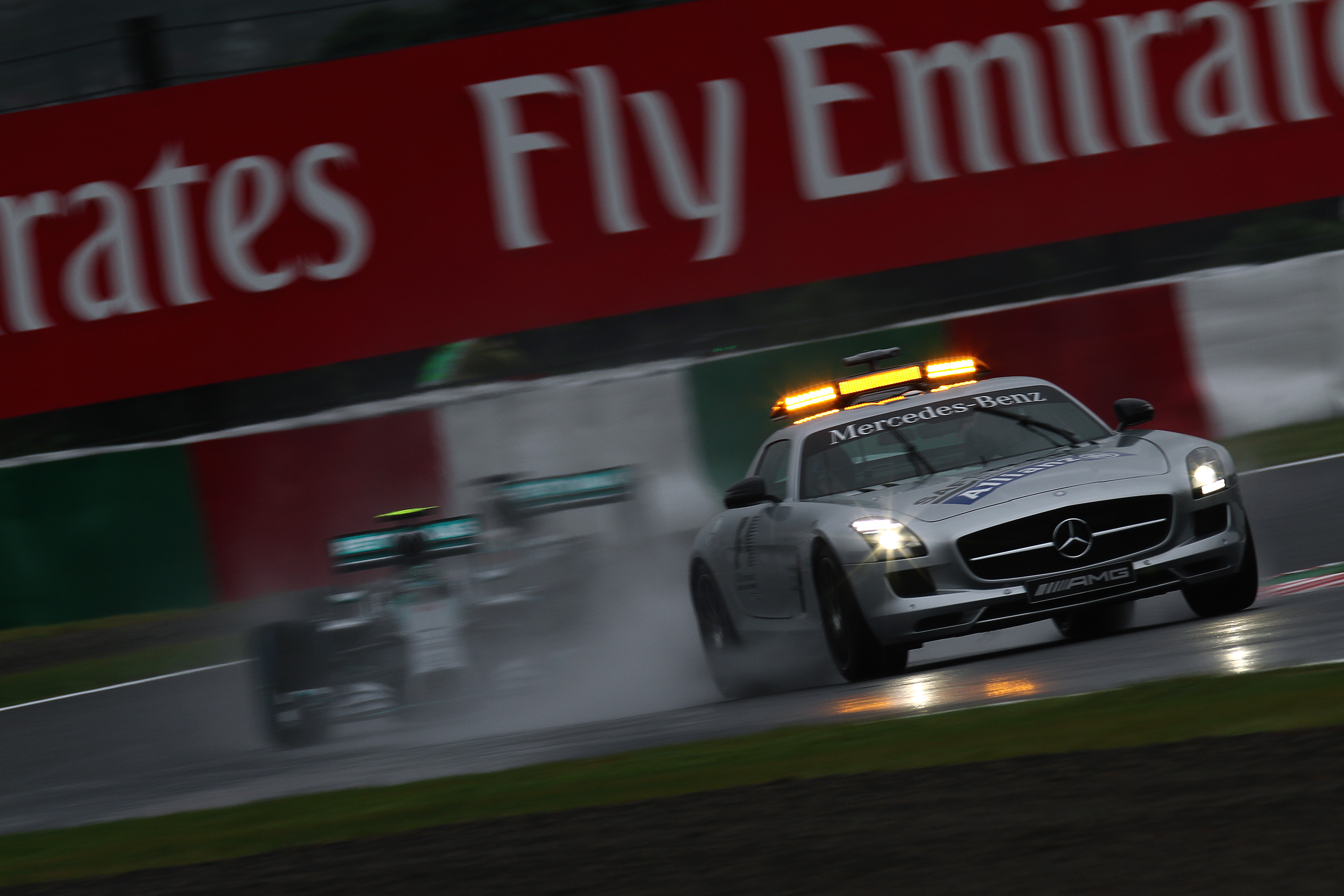 2014.10.5 F1 Rd.15 Suzuka Final, Mercedes SLS AMG [IMG_5462ks]